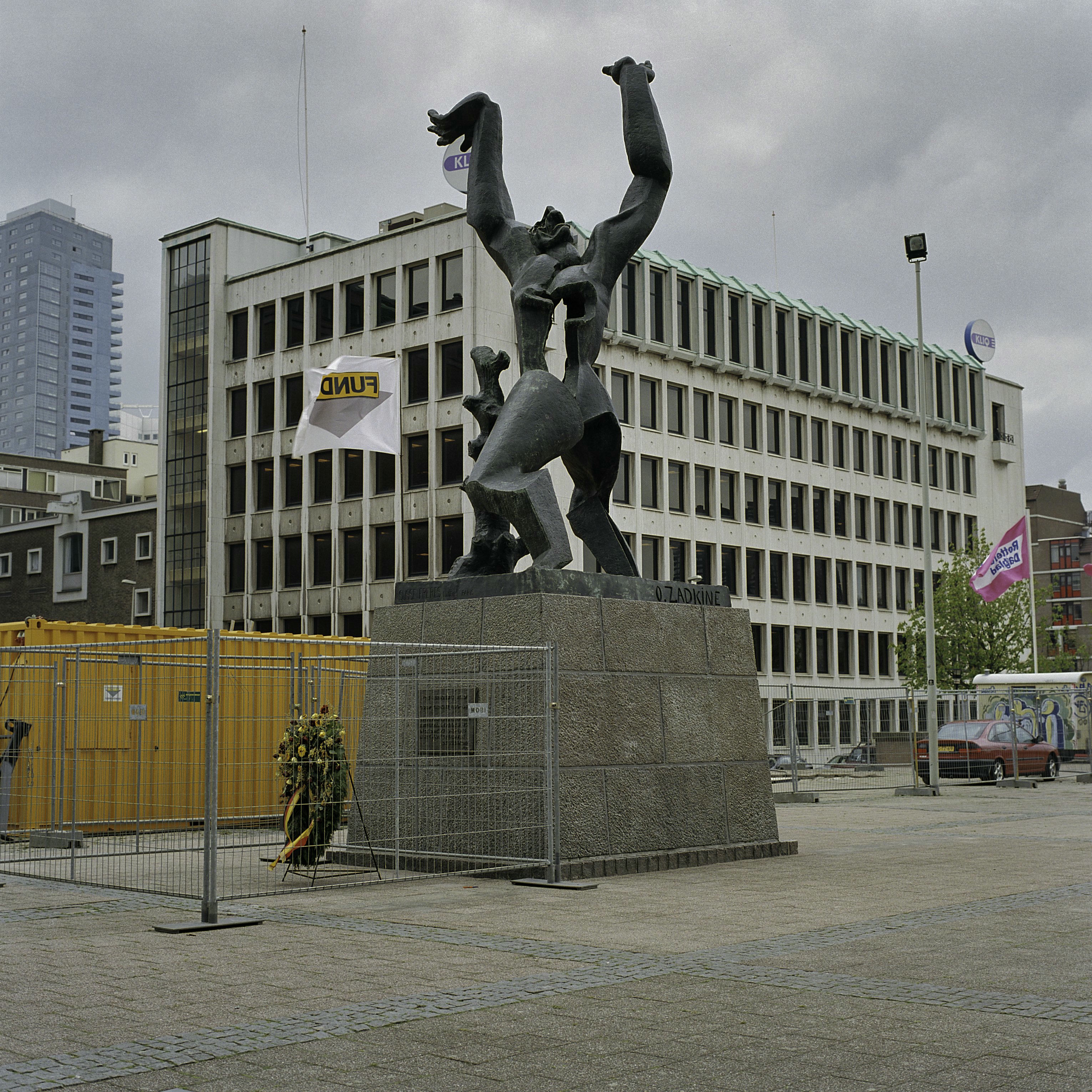 Monument De Verwoeste Stad: Overzicht standbeeld (opmerking: Gefotografeerd voor Monumenten In Nederland Zuid-Holland)